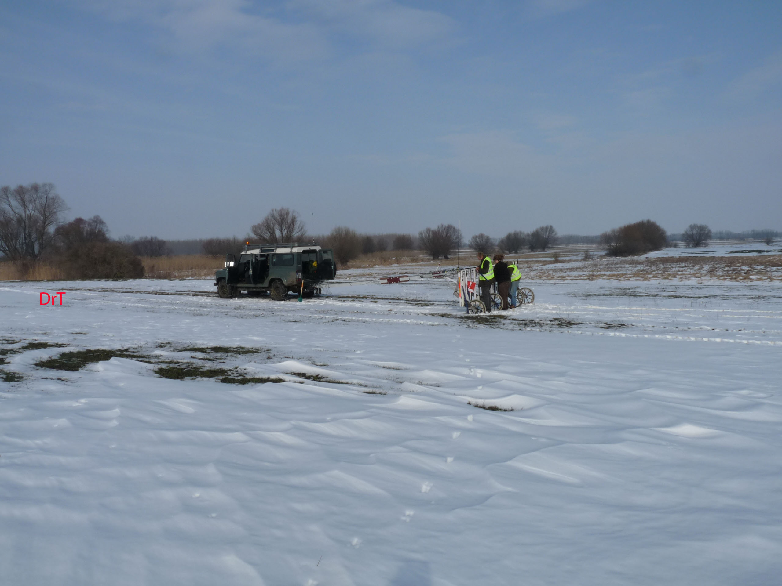 Geomagnetik Mursella